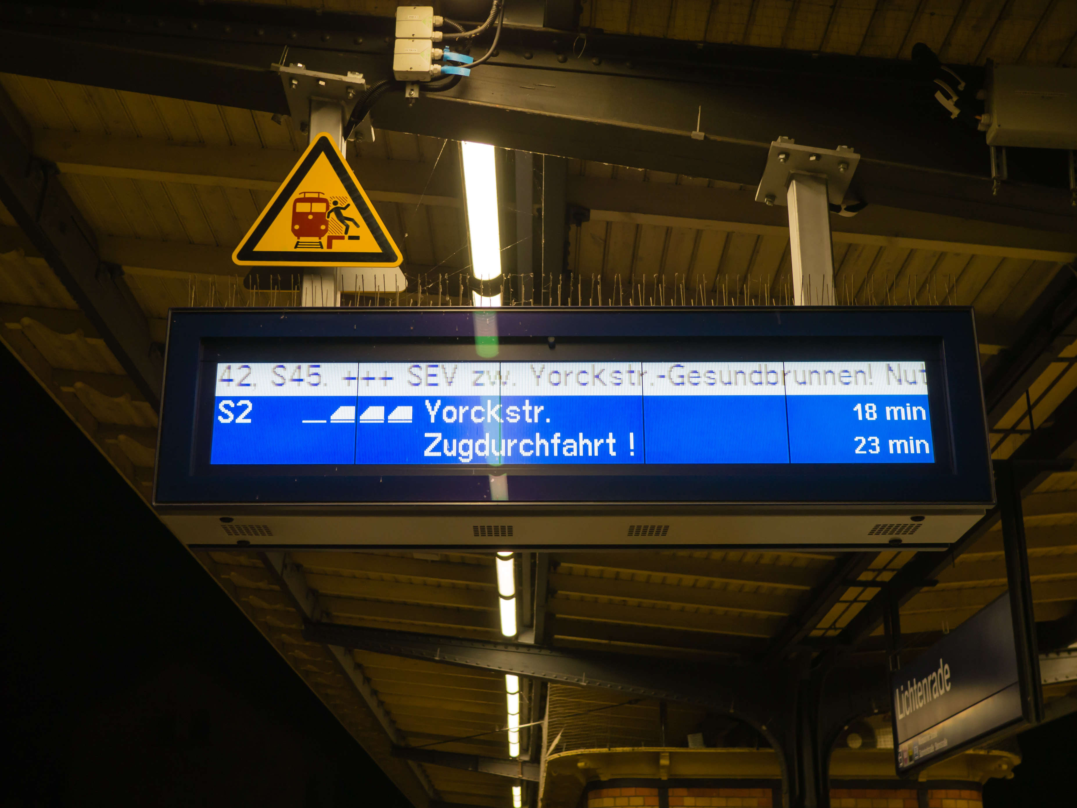 Anzeige "Zugdurchfahrt" am S-Bahnhof Lichtenrade in Berlin. Diese Anzeige wird regelmäßig bei in Lichtenrade aussetzenden Zügen angezeigt, obwohl das östliche Bahnsteiggleis stumpf endet.